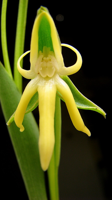 Habenaria trifida Kunth